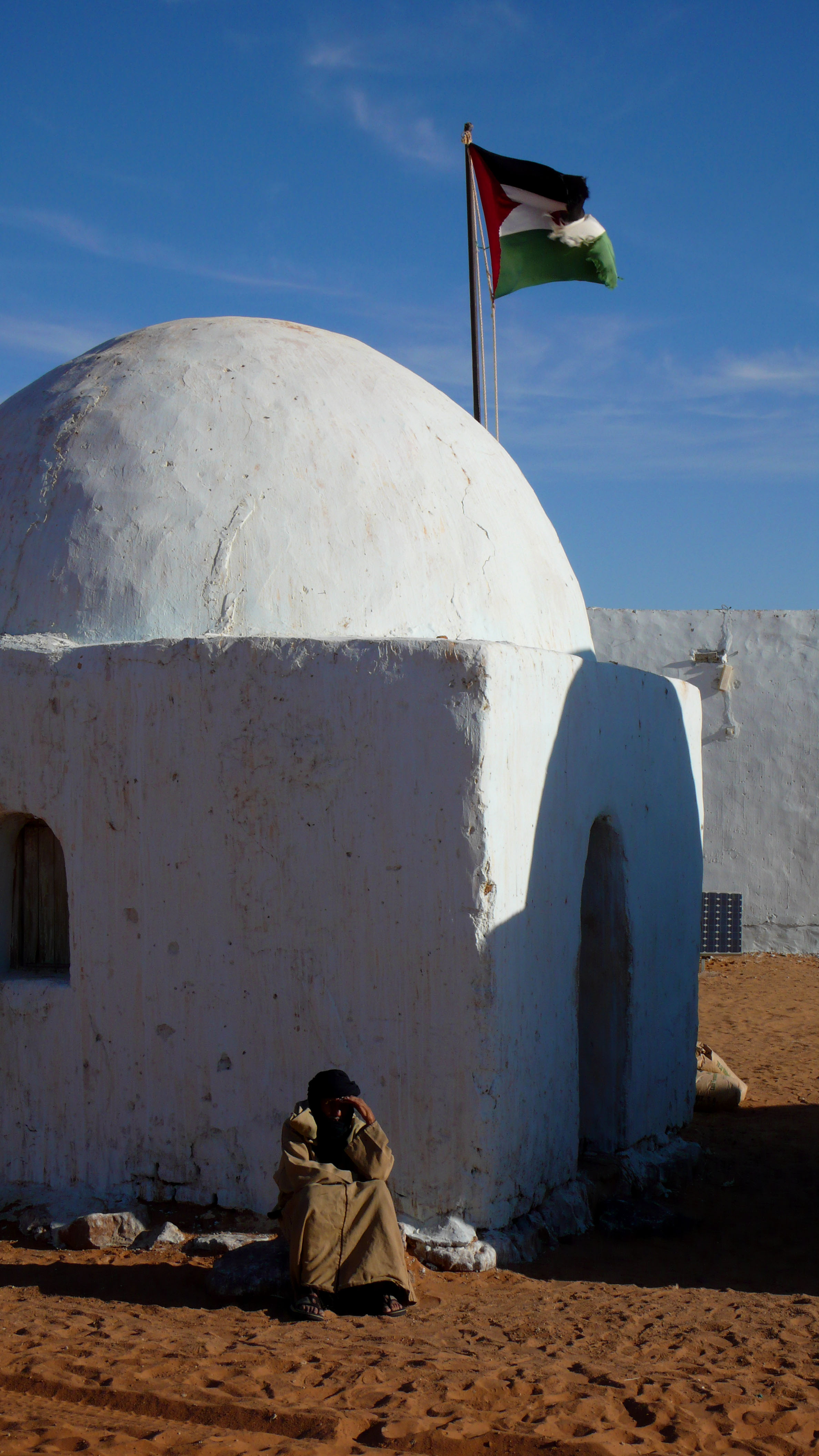 Imagen de la wilaya de Dajla, en los campamentos de refugiados saharauis de Tinduf.